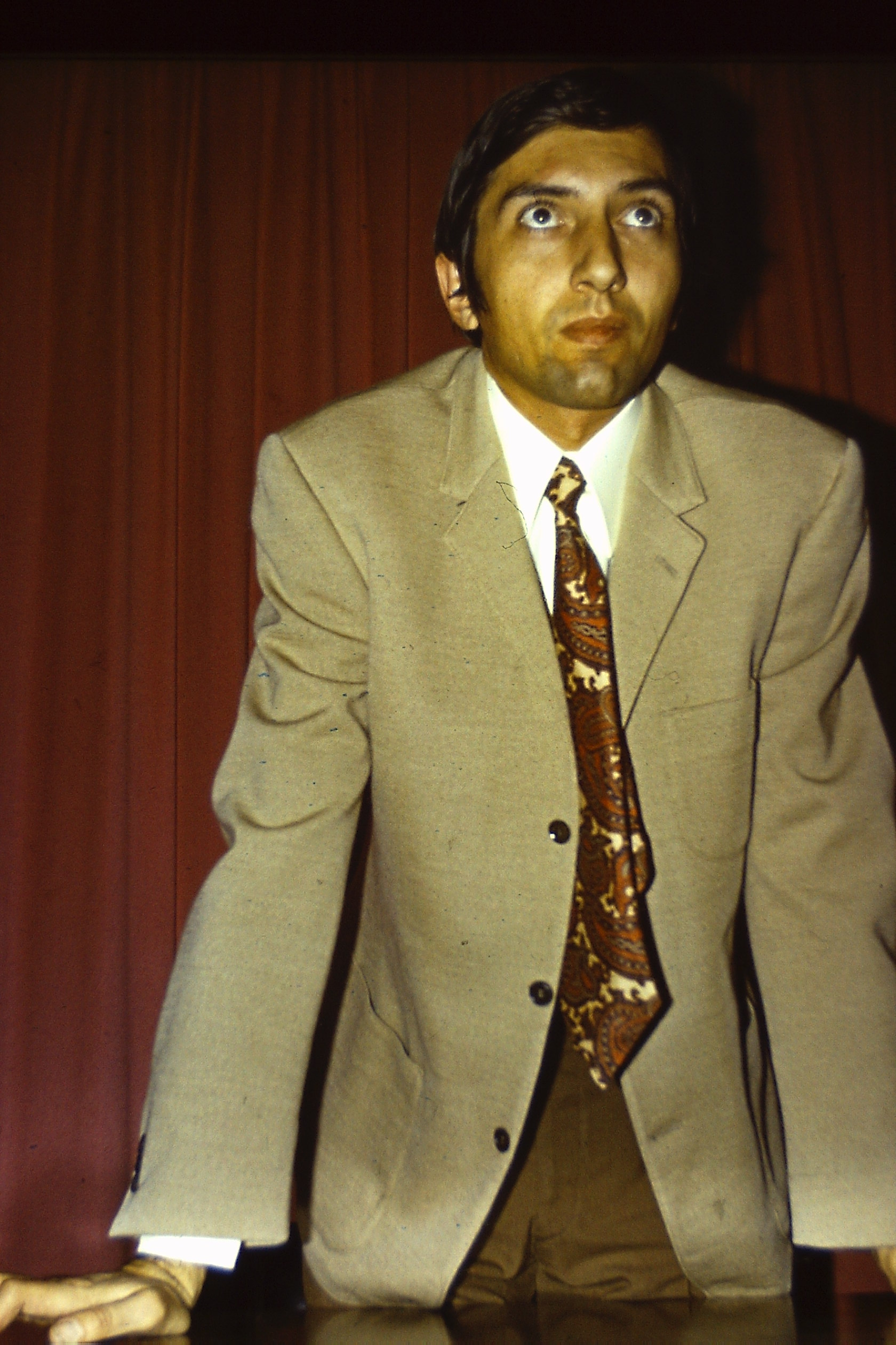 LE PEINTRE PIERRE CÉLÉSTIN VANRO